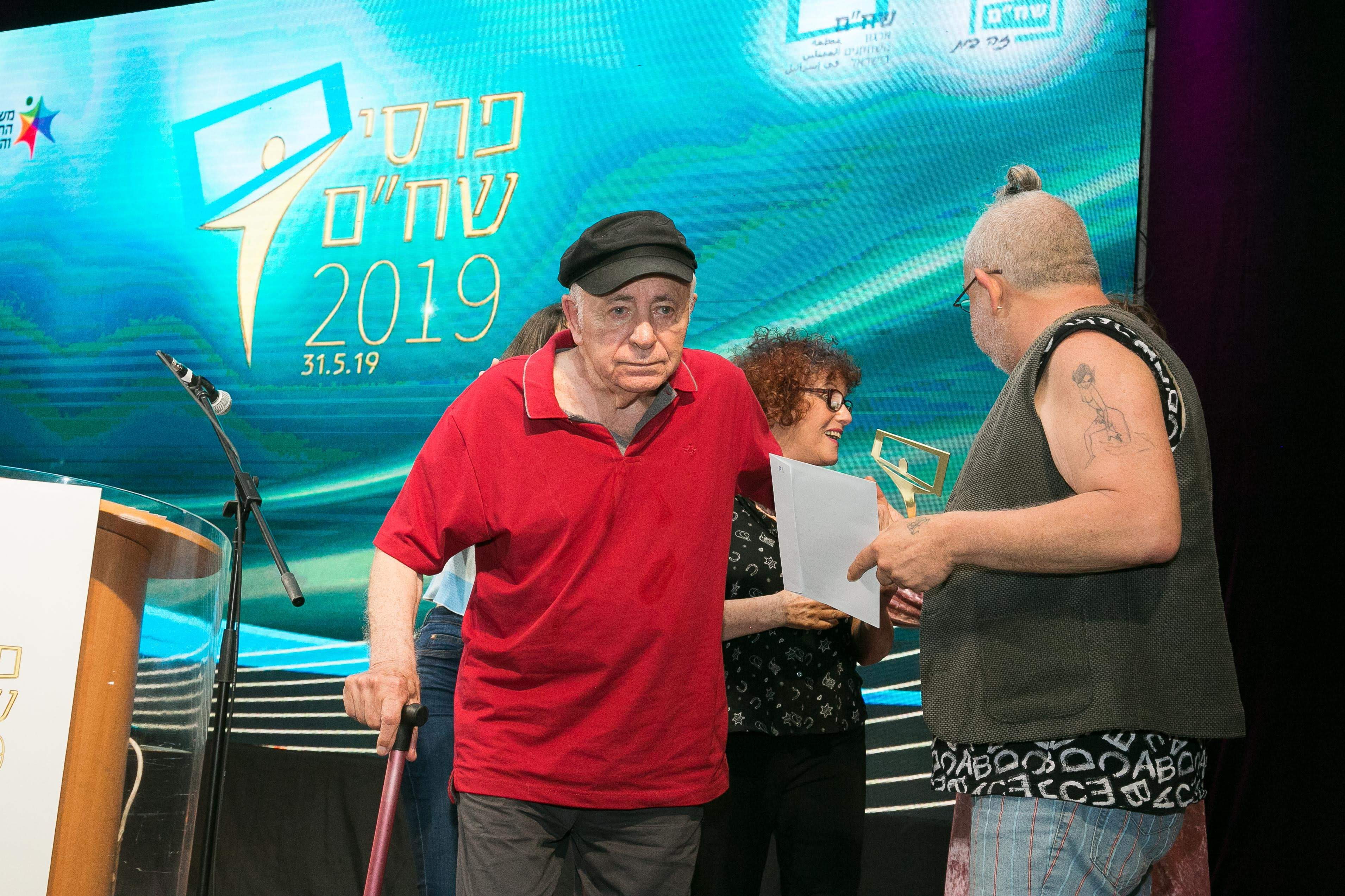 יוסף כרמון מקבל את פרס שח"ם על מפעל חיים לשנת 2019